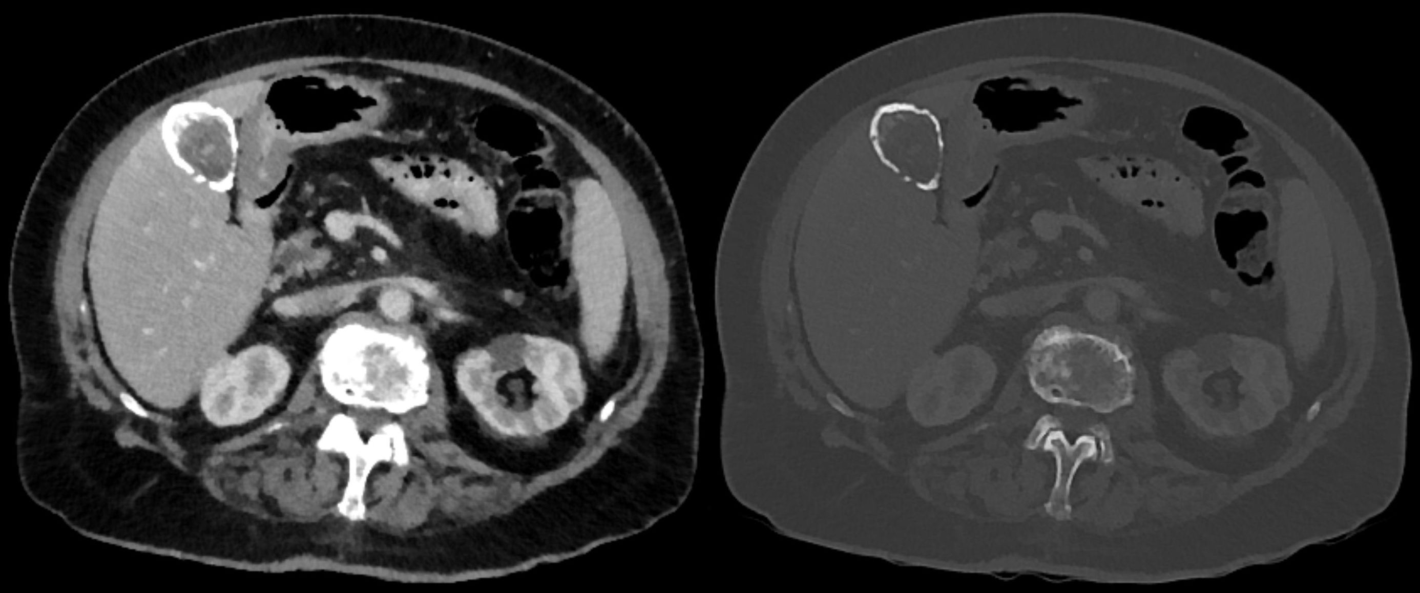 Computertomographie einer Porzellangallenblase bei einem alten Patienten. Man erkennt links im Weichteilfenster, rechts im Knochenfenster gut die groben Verkalkungen der Gallenblasenwand am ehesten im Rahmen einer chronischen Cholezystitis.